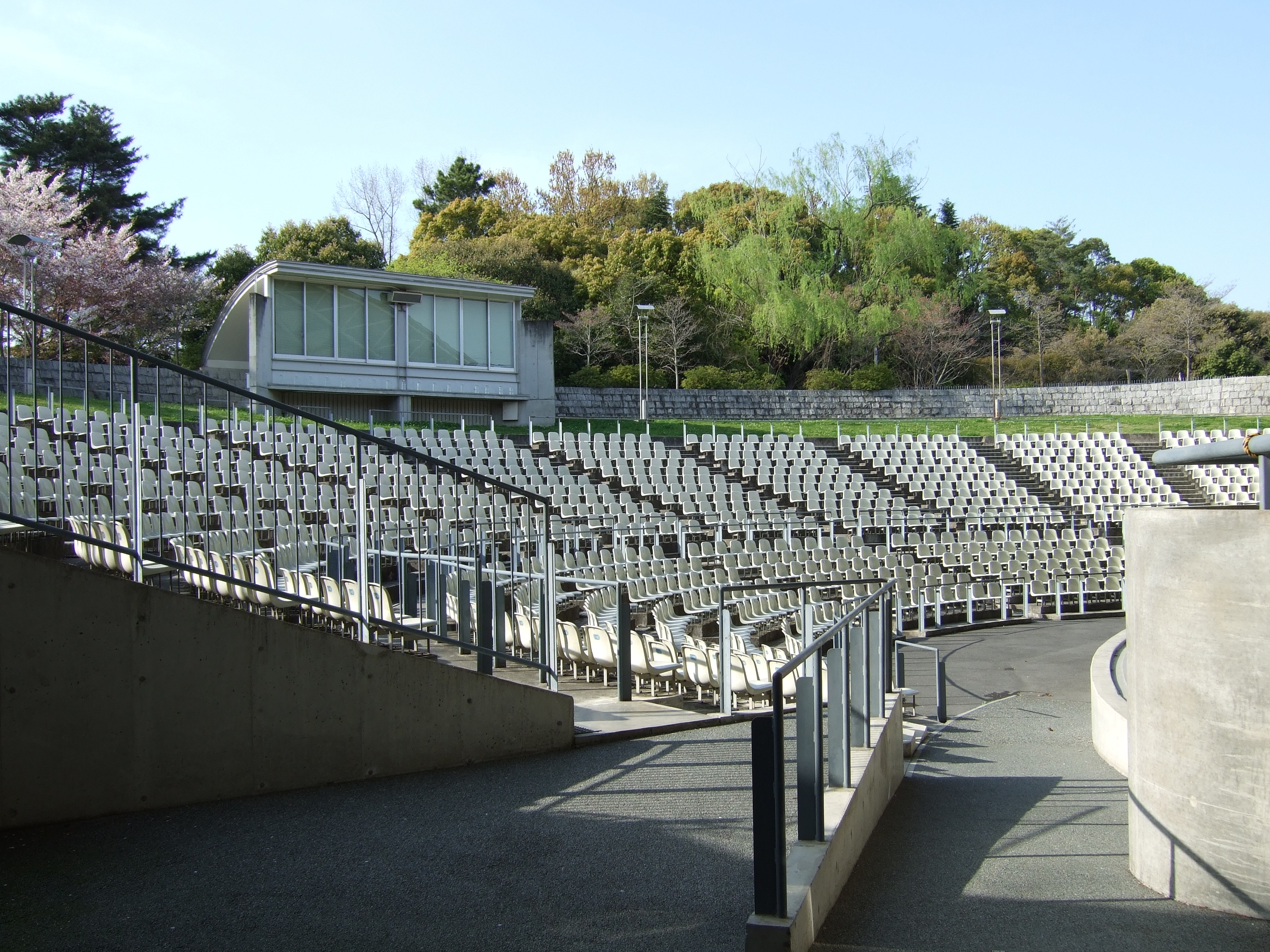 Toyonaka Hattori Ryokuchi